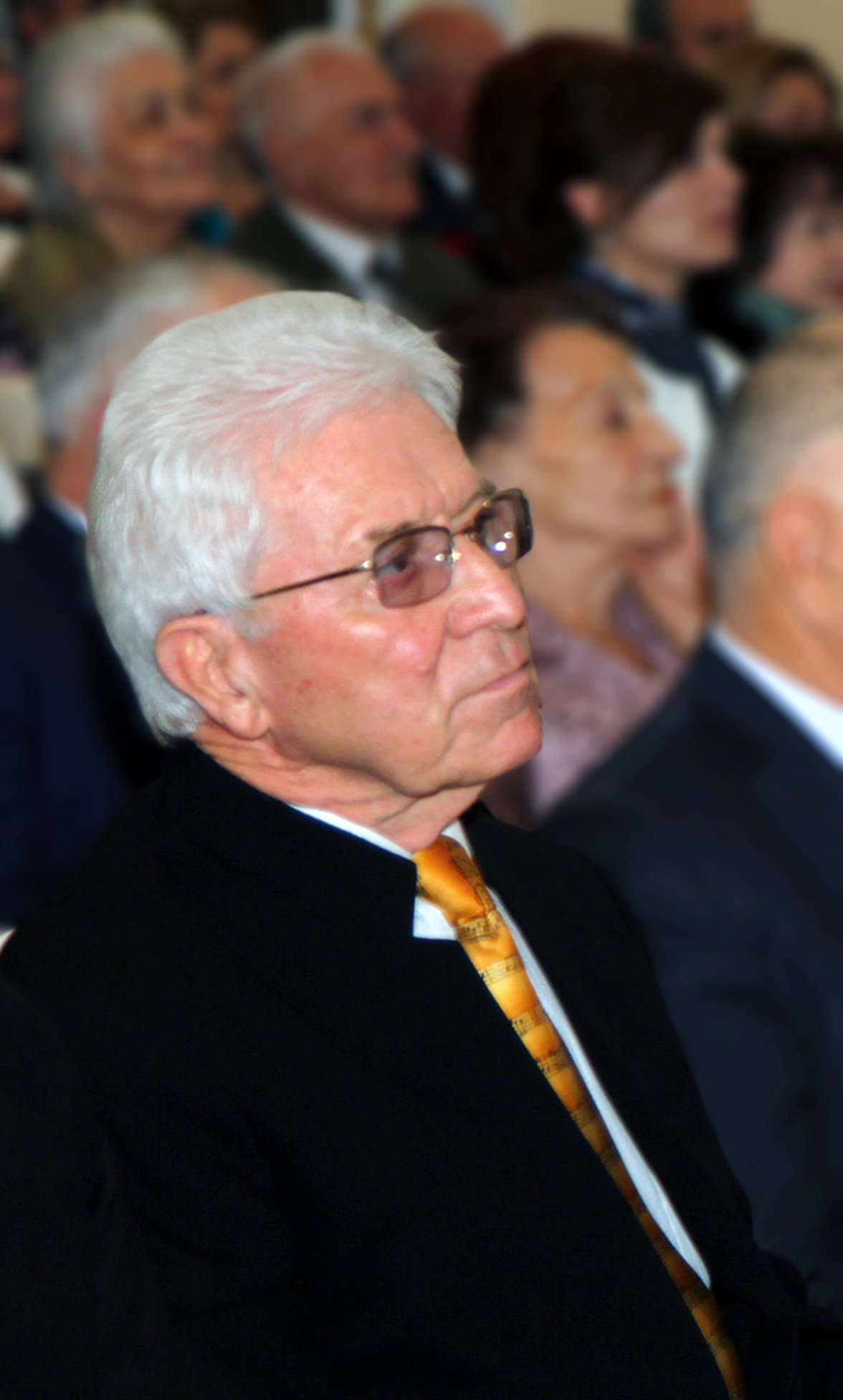 Б. Х. Темирканов на юбилее К. Эфендиева, 2015 г.